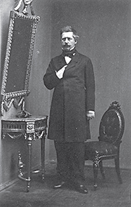 Беларуская (тарашкевіца): Партрэт Эдварда Чапскага (Edvard Čapski)